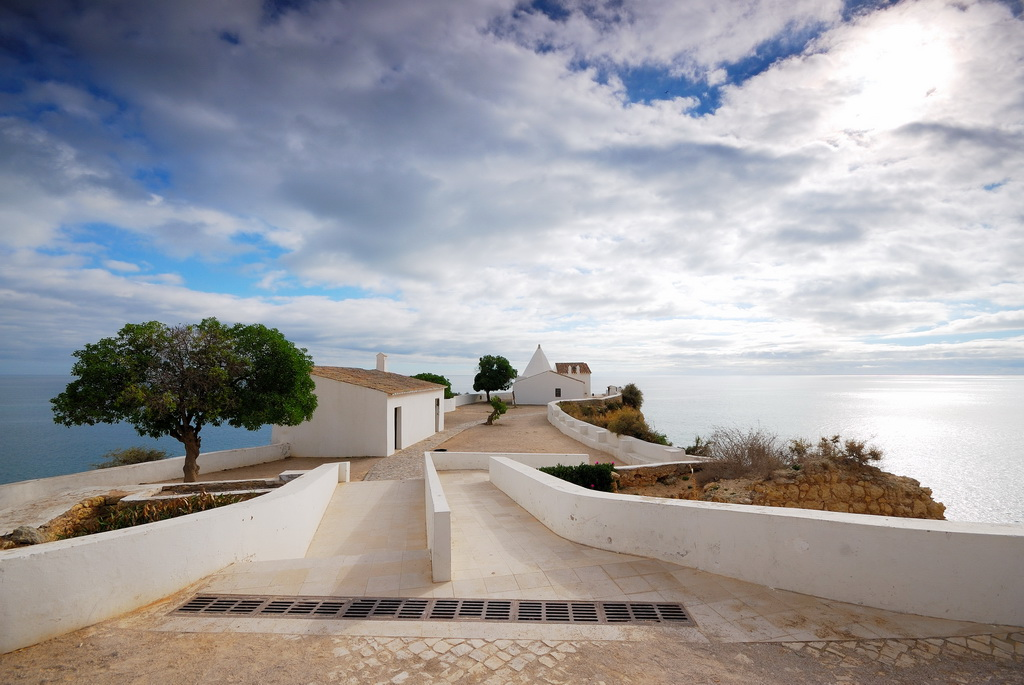 Capela da Nossa Senhora da Rocha em Porches, Algarve, Portugal